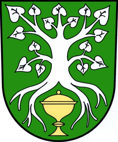 znak, Šebkovice, okres Třebíč